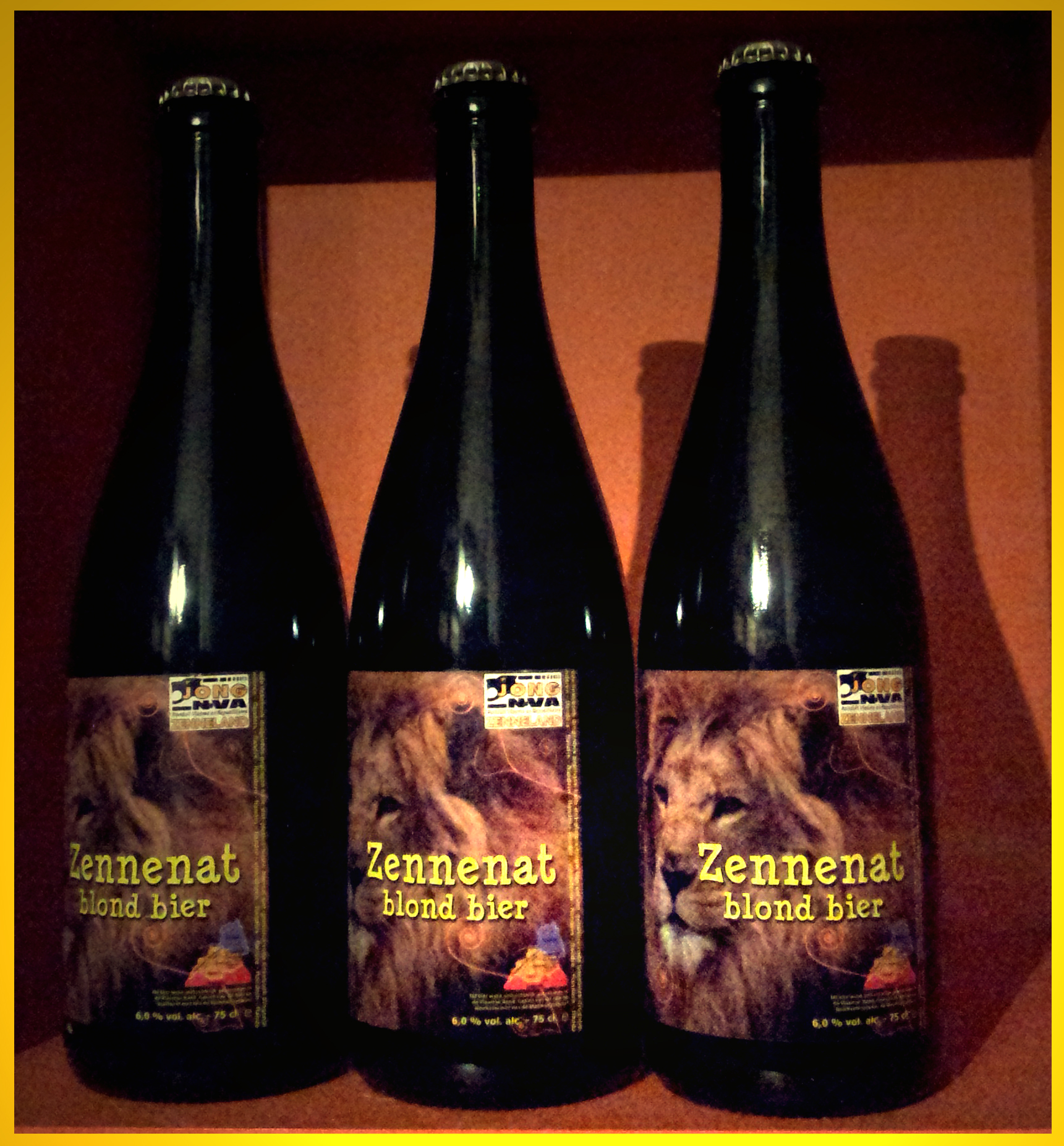 Zennenat, 75cl fles